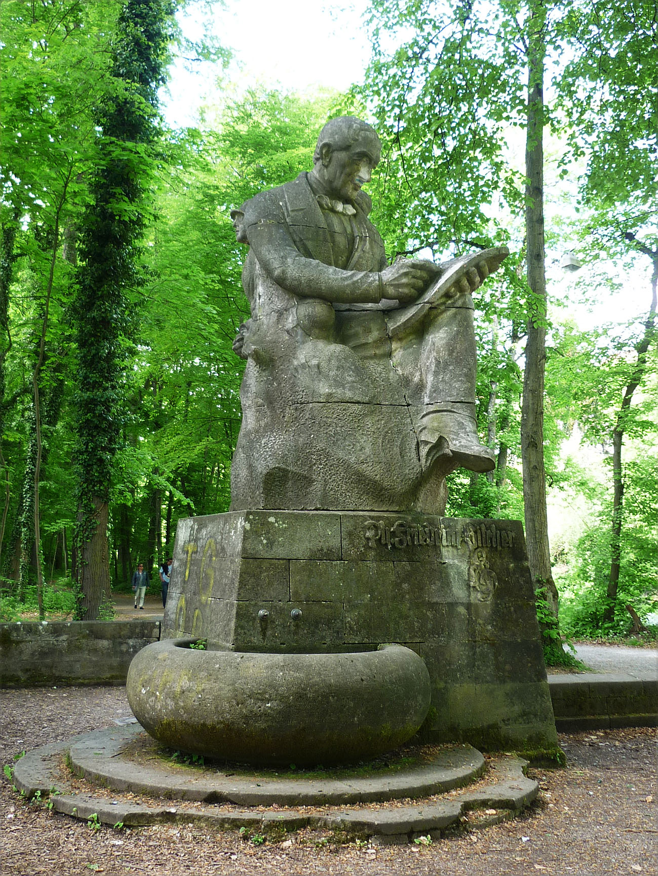 Silcherdenkmal in Tübingen (Württemberg)